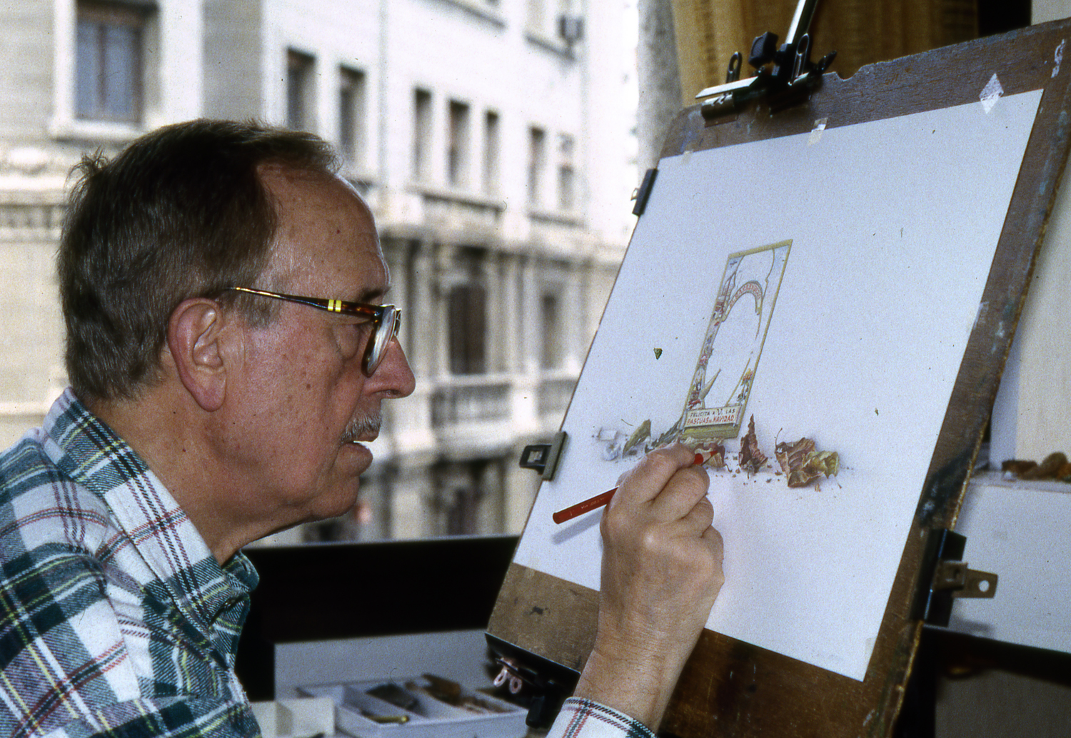 Manuel Carnicer Fajó trabajando en su estudio de Rambla de Catalunya, de Barcelona